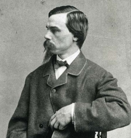 Cliché photographique du peintre Louis Rémy Mignot (1831-1870) vers 1860.